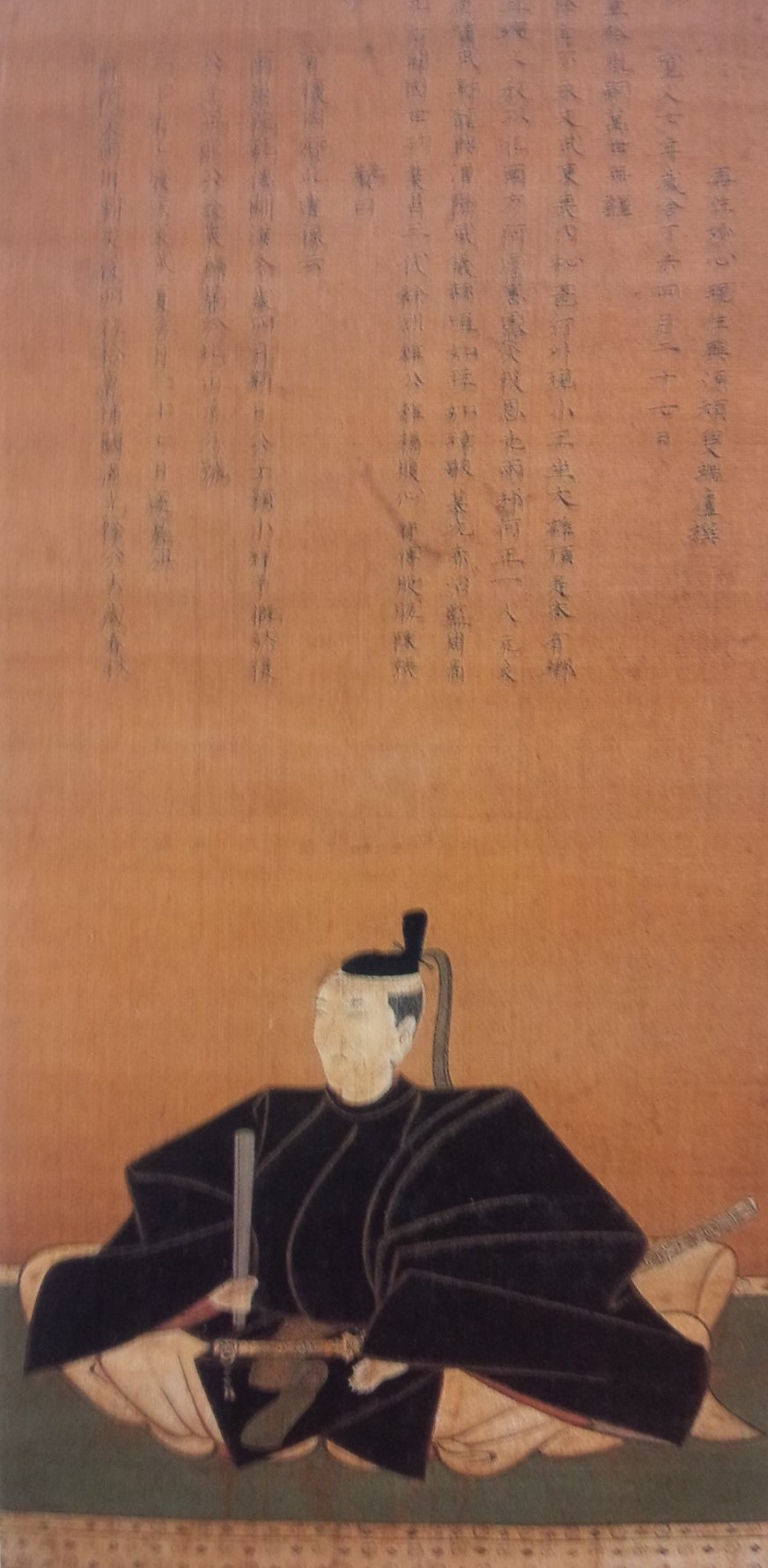 蜂須賀光隆の肖像。